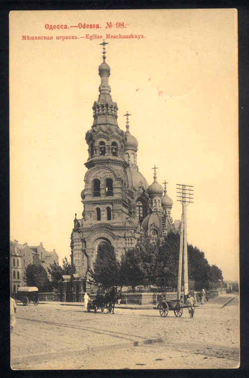 Вознесенська церква міщанського товариства Одеси. Вул. Старопортофранківська. Закладена у 1891 р., освячена у 1897 р., зруйнована більшовиками у 1930-х роках.